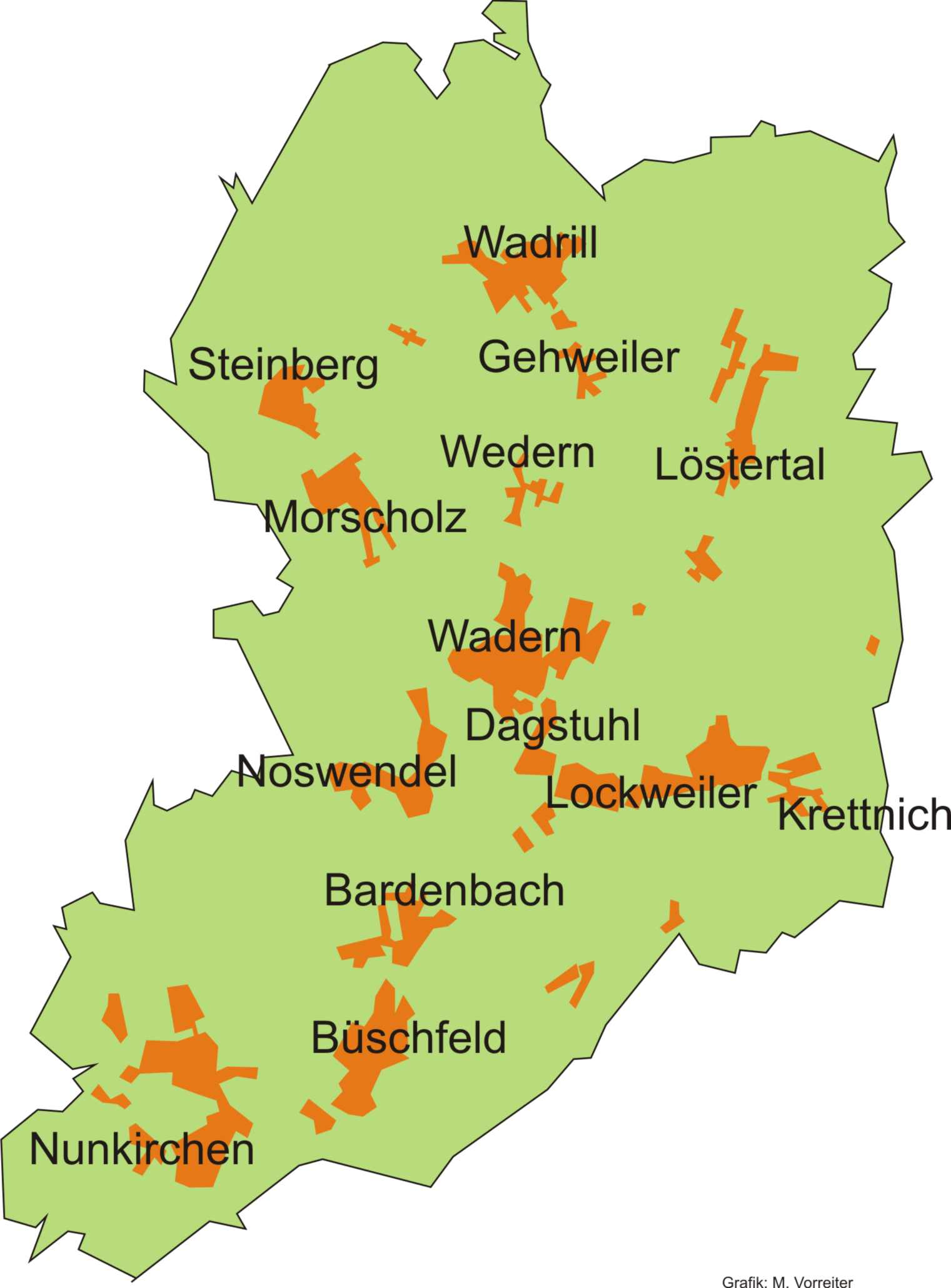 Die Karte zeigt die Lage der 14 Stadtteile auf dem Gebiet der Stadt Wadern.